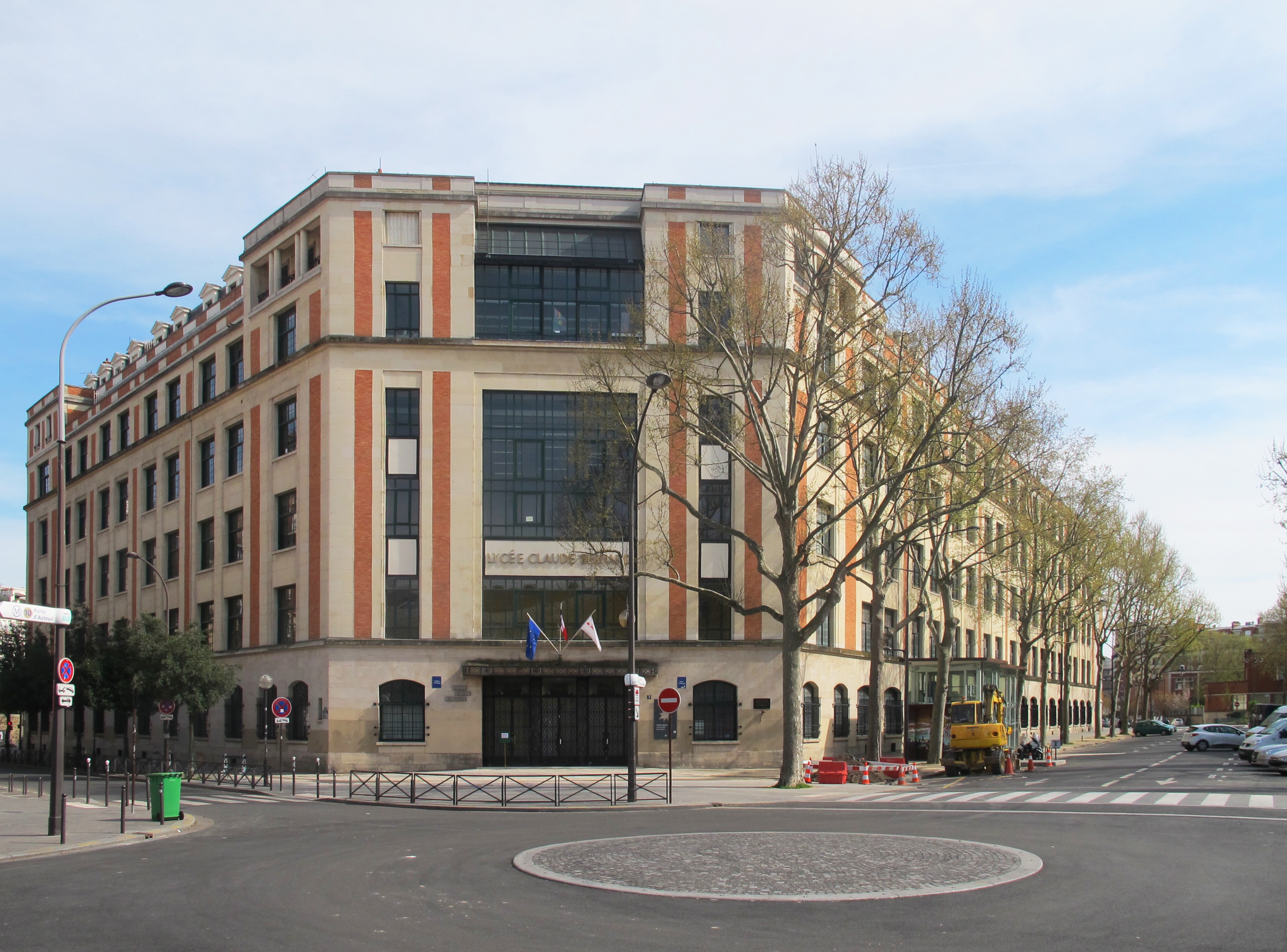 Façade du lycée Claude-Bernard.